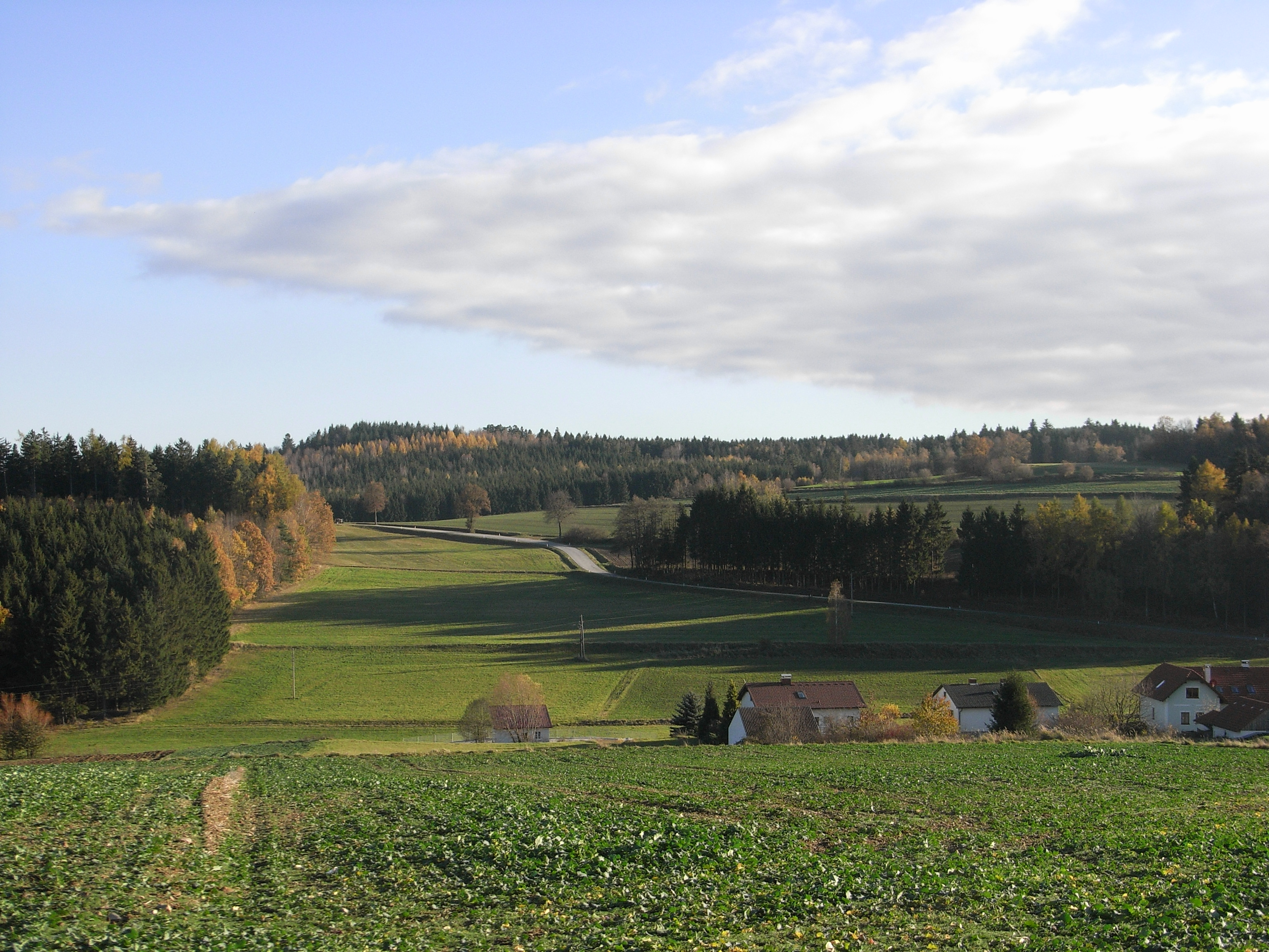 Ein Blick von Puch im Thaya-Hochland in die Waldviertler Landschaft Richtung Losberg (651m).